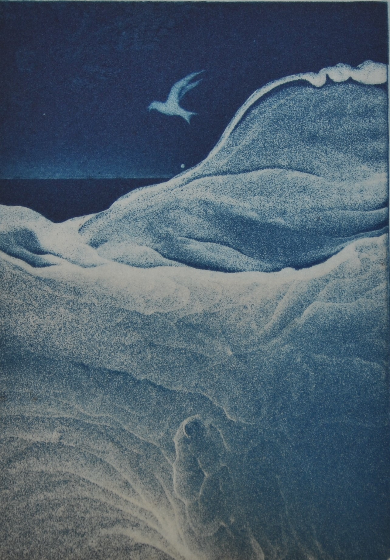 Flug über den Wellen, 1985, Radierung (Aqua Tinta), 15/25, 20x30 cm